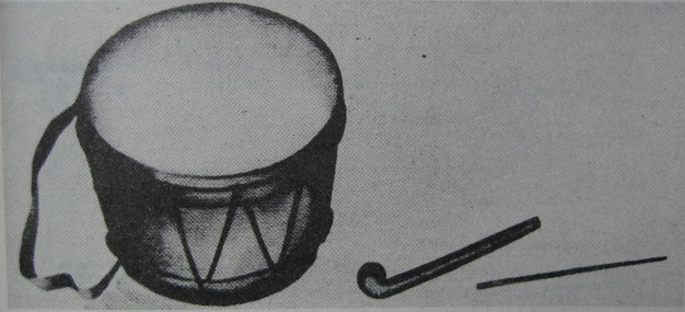 Çubuqlı davul